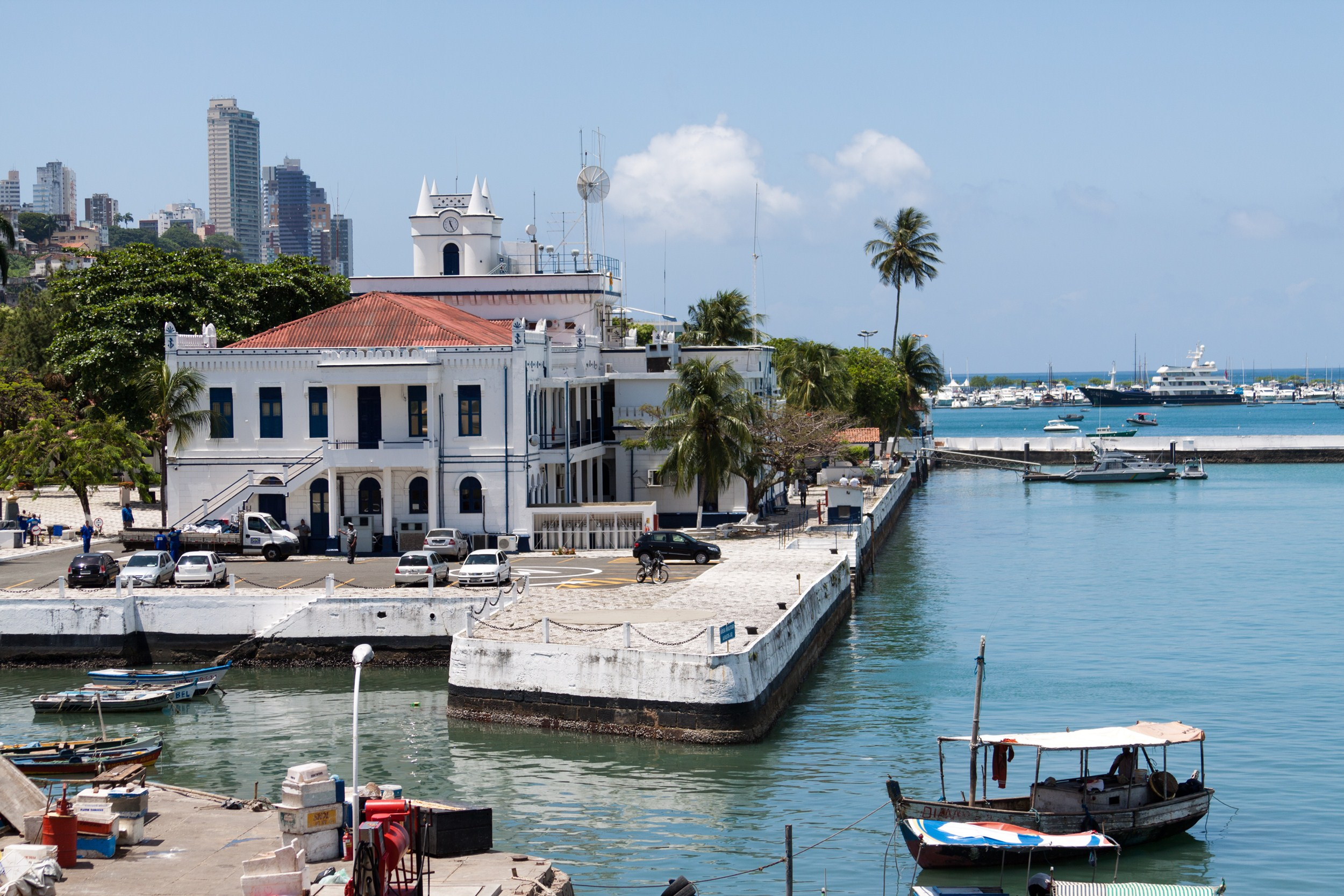 2º Distrito Naval da Marinha do Brasil, em Salvador.